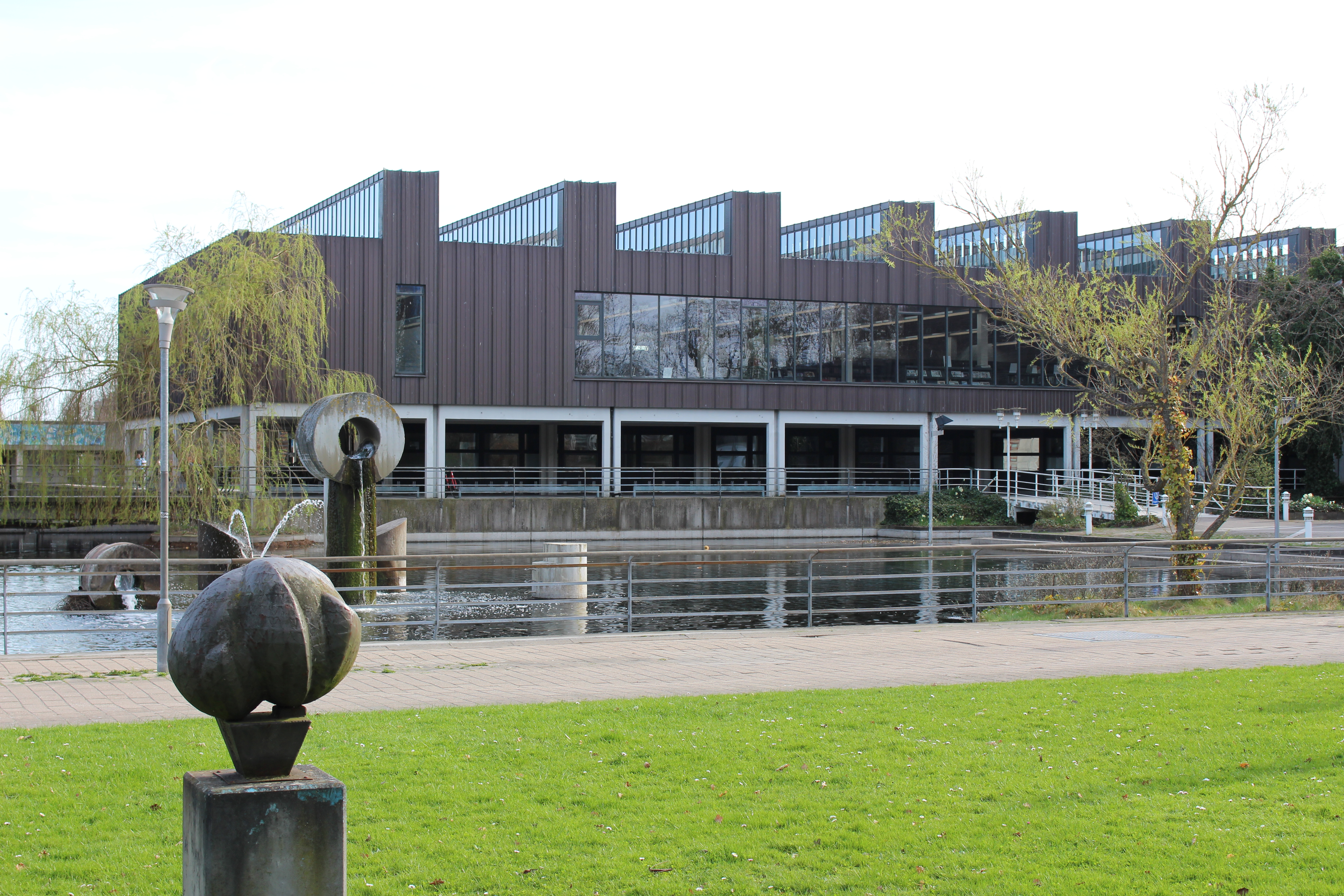 Alb Bibliotek